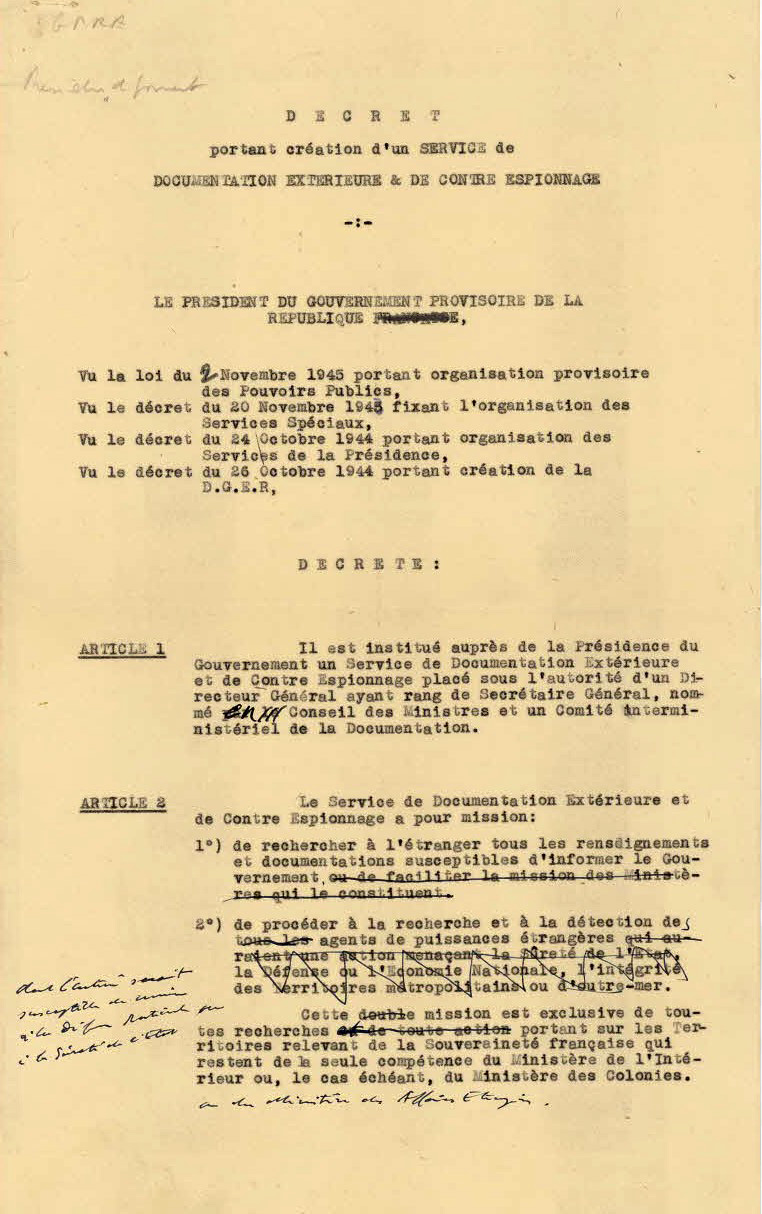 Décret portant création du Service de documentation extérieure et de contre–espionnage (SDECE), version préparatoire annotée par de Gaulle